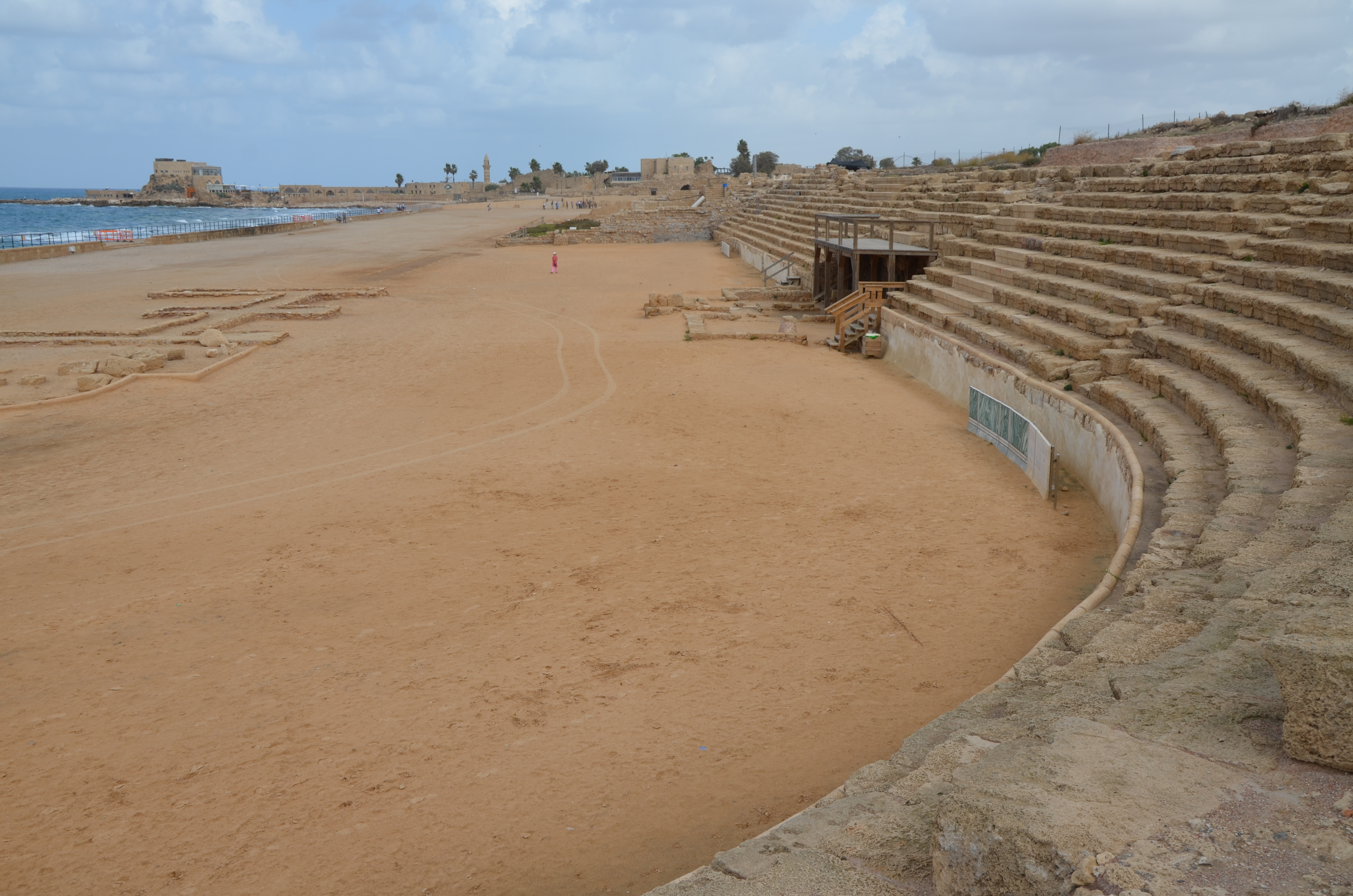 Caesarea